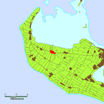 Lea faka-Tonga: no original description